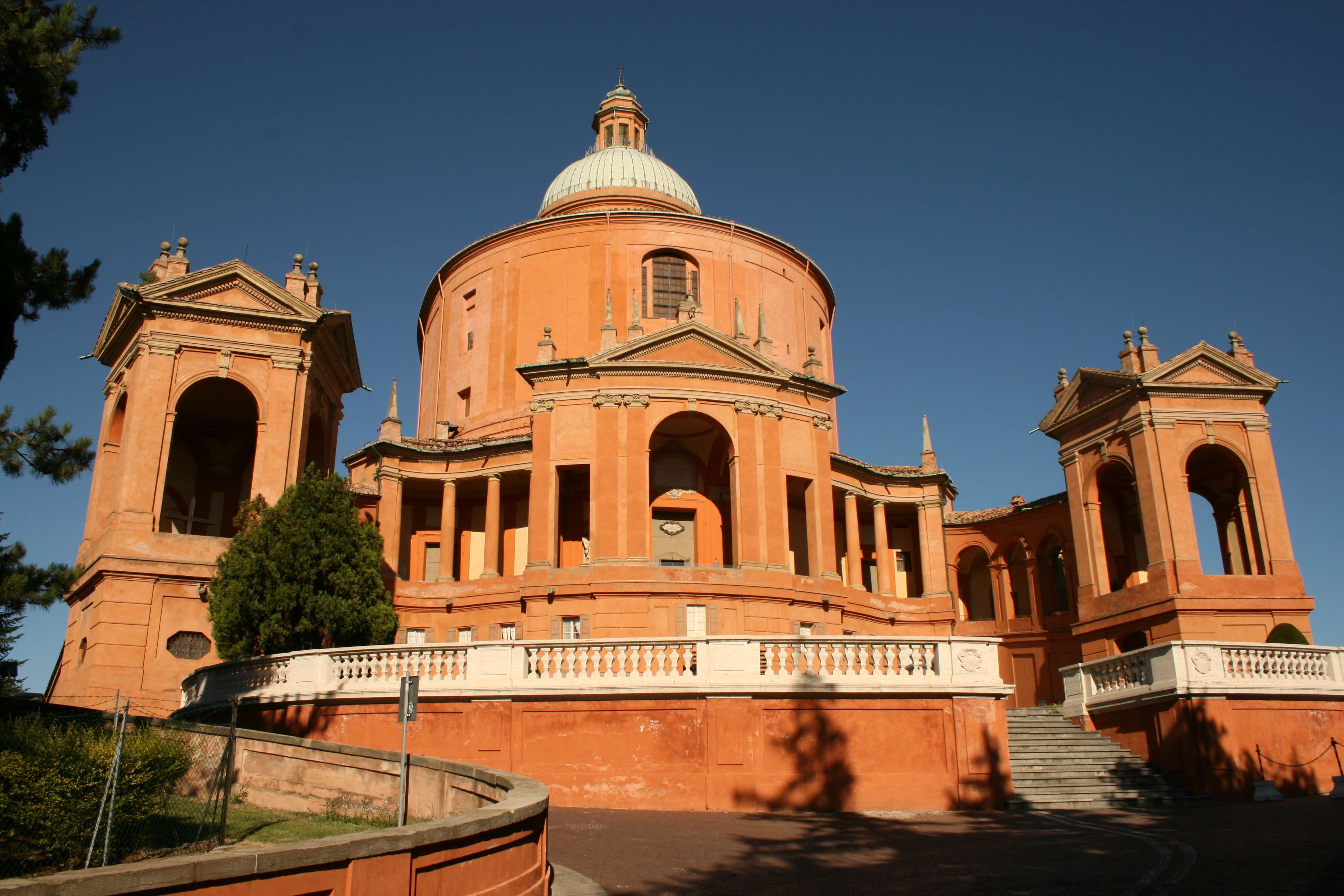 Basilica della Beata Vergine di San Luca sul Colle della Guardia